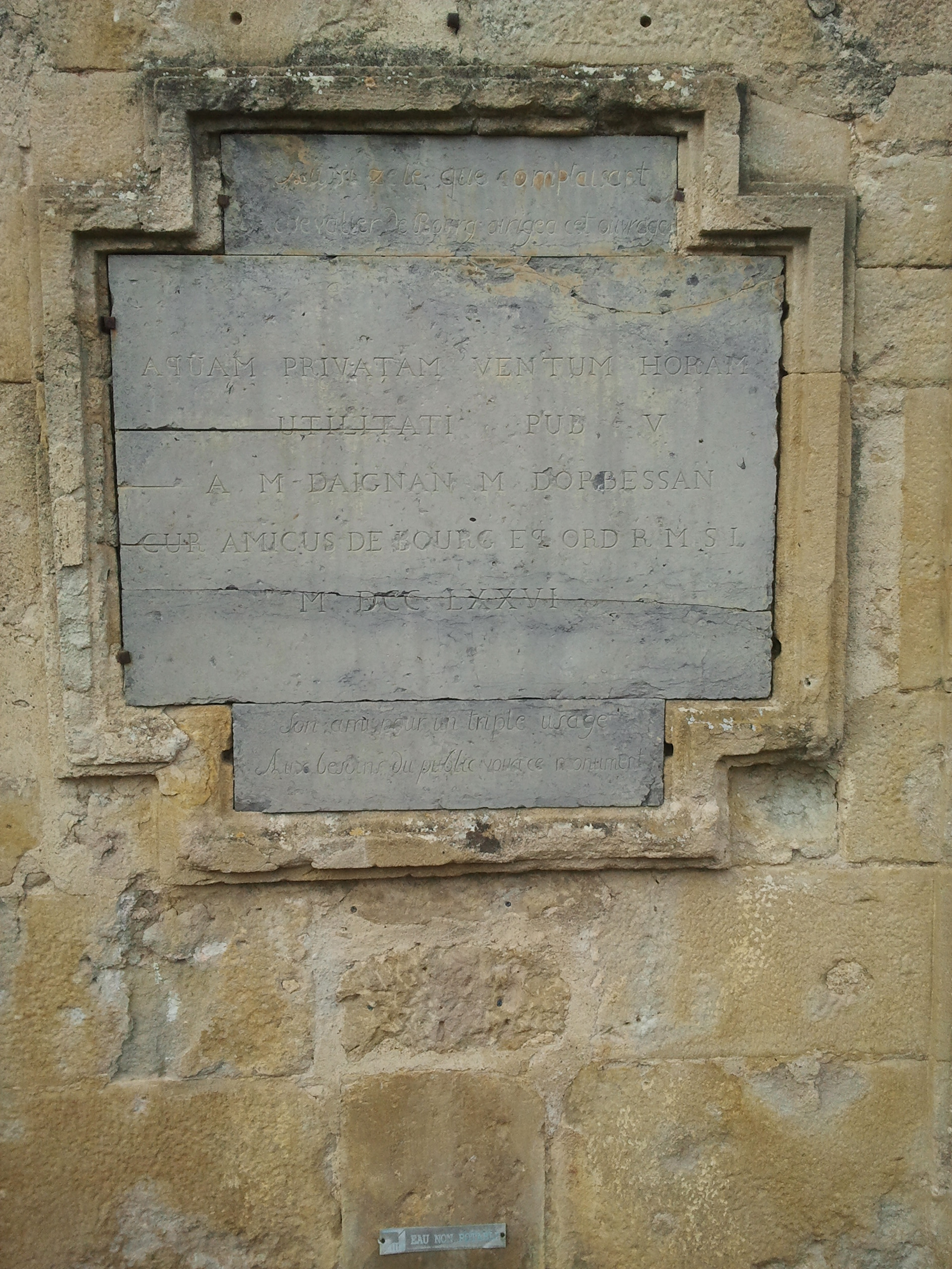 Plaque sur la fontaine d'Orbessan .